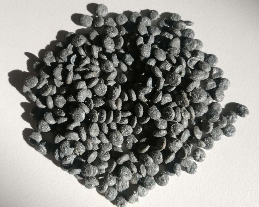 Ecoallene in grani